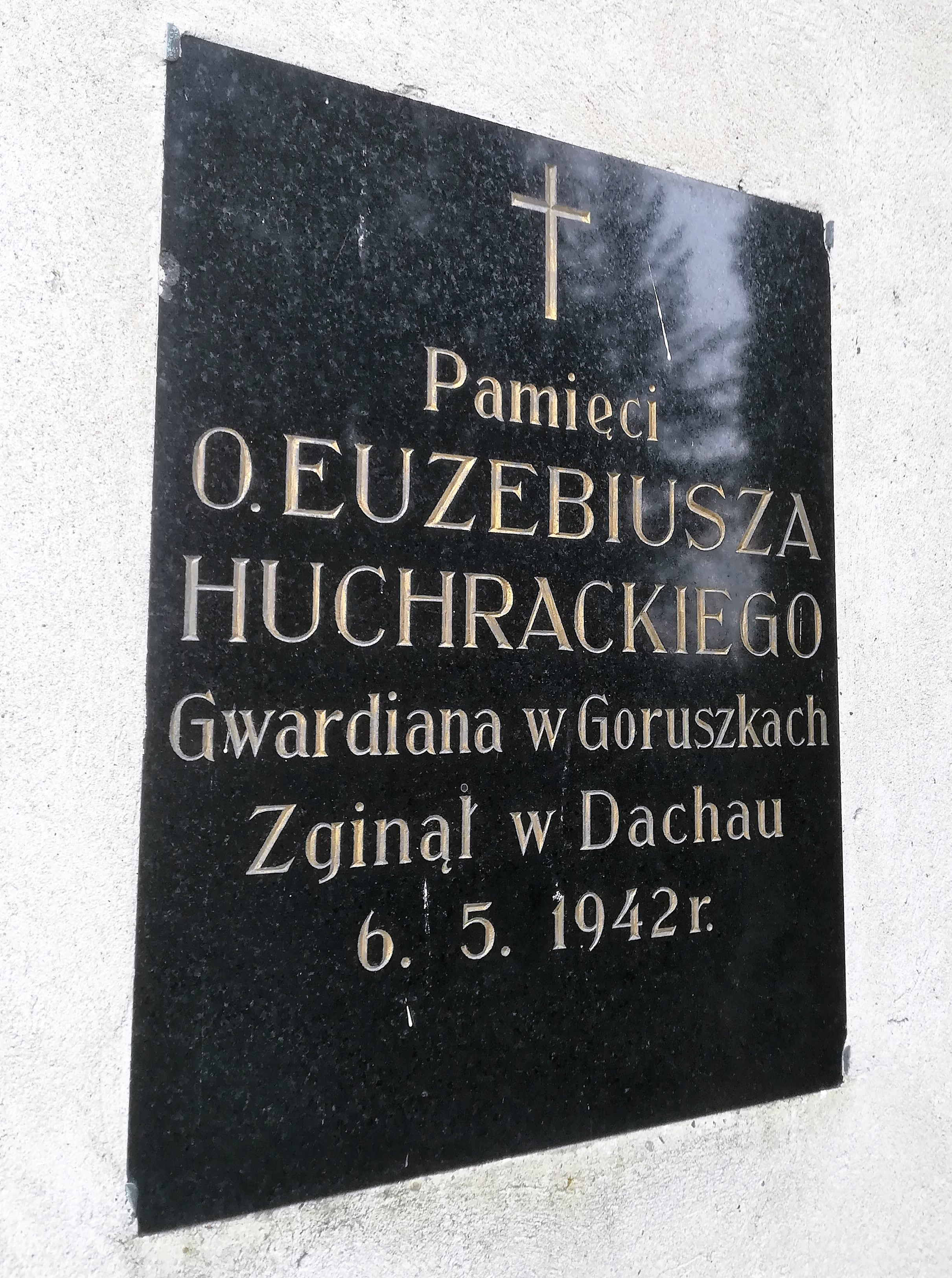 Tablica Euzebiusza Huchrackiego przy klasztorze w Goruszkach.